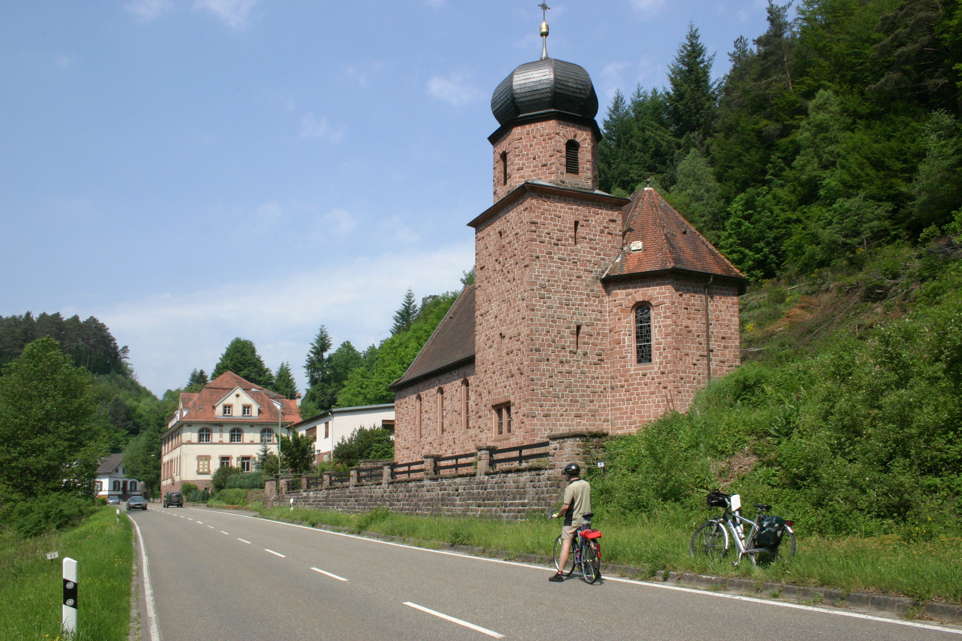 Pfälzerwald